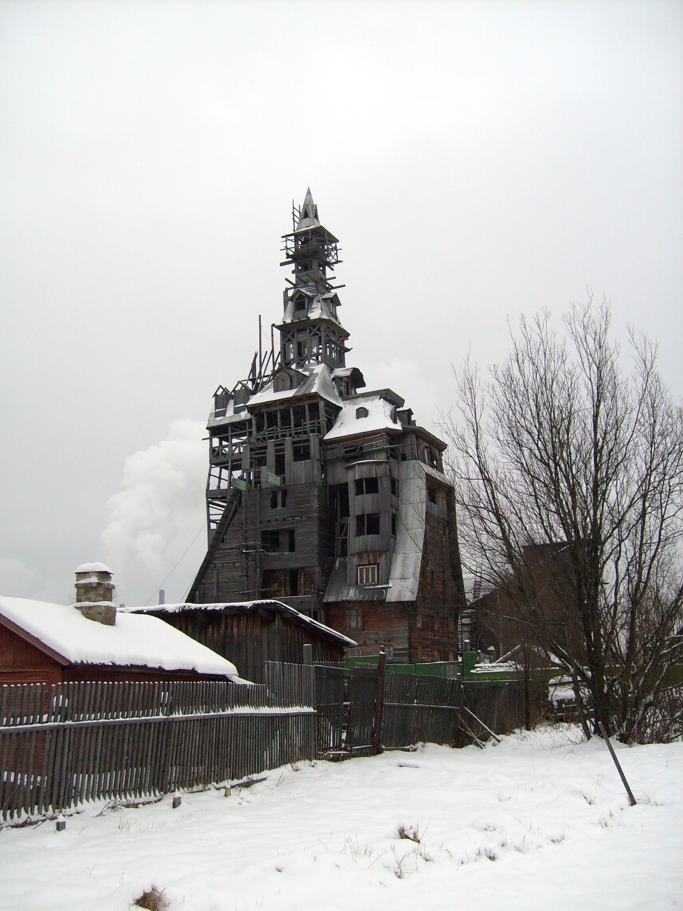 13-этажный деревянный дом Николая Сутягина в Архангельске